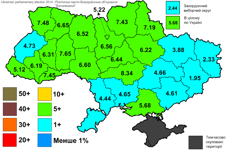 Результати виборів до Верховної Ради України, які відбулись 25 жовтня 2014 року. Інформація з офіційного сайту ЦВК. Політична партія Всеукраїнське об’єднання "Батьківщина".